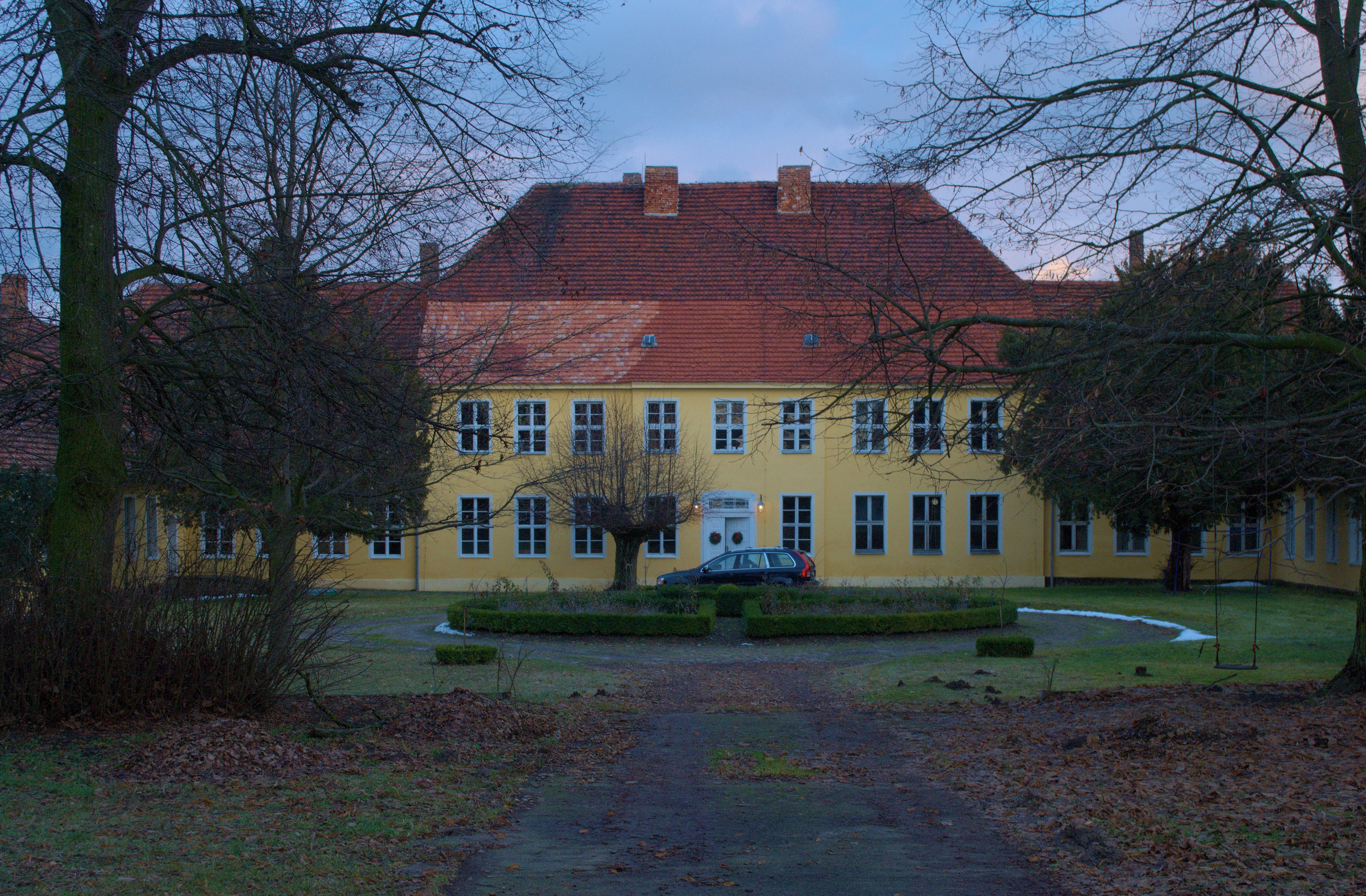 Die Gutsanlage in Blumberg. Schönower Chaussee